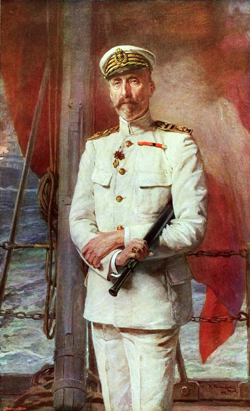 Portret arcyksięcia Karola Stefana Habsburga